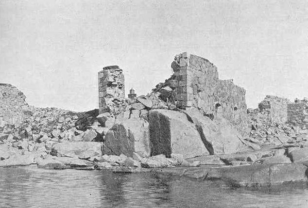 The ruins of Gustafsvärn outside Hangö (Hanko), built 1793-1808.